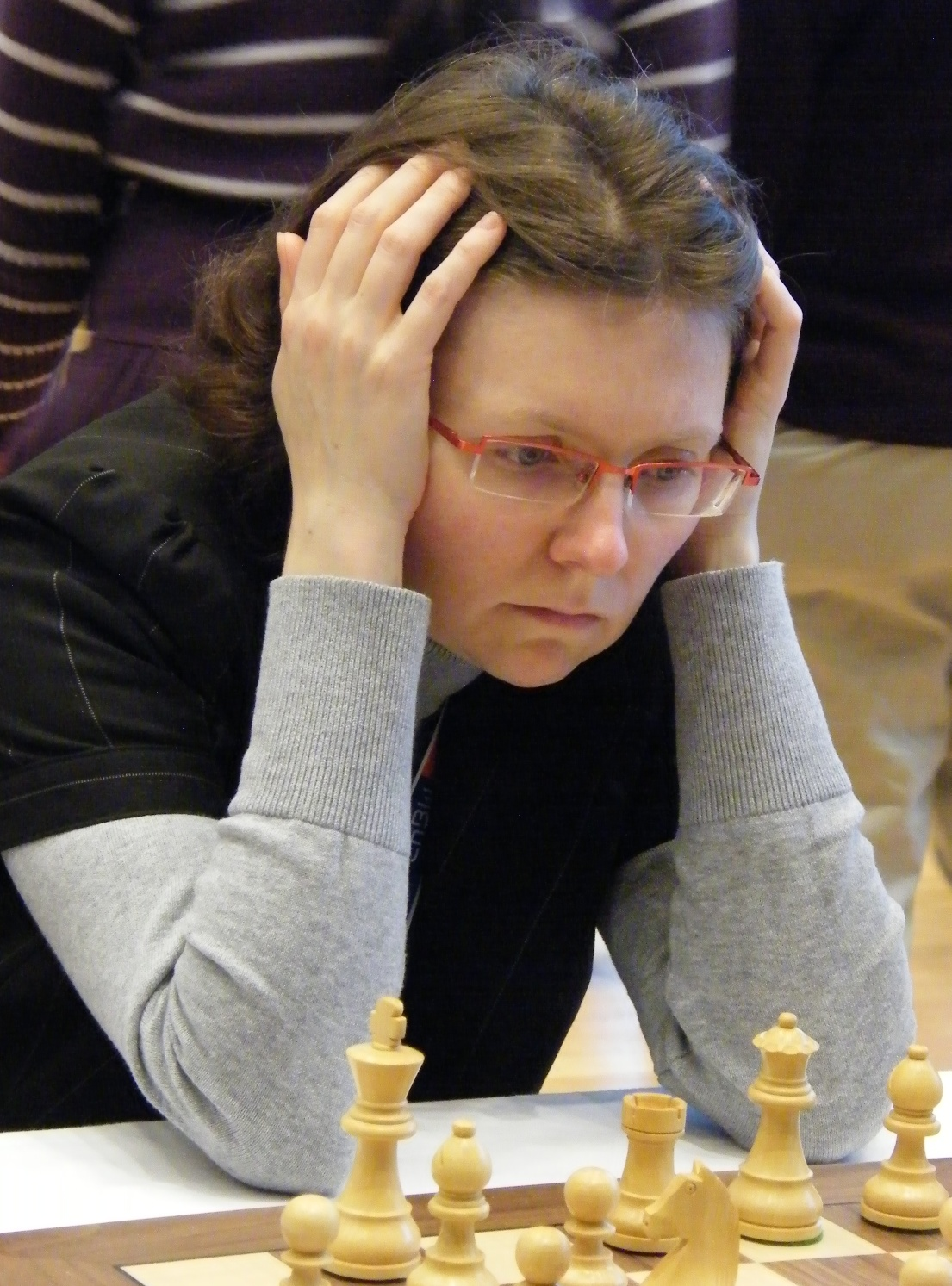 Maria Leconte bei der 38. Schacholympiade in Dresden 2008